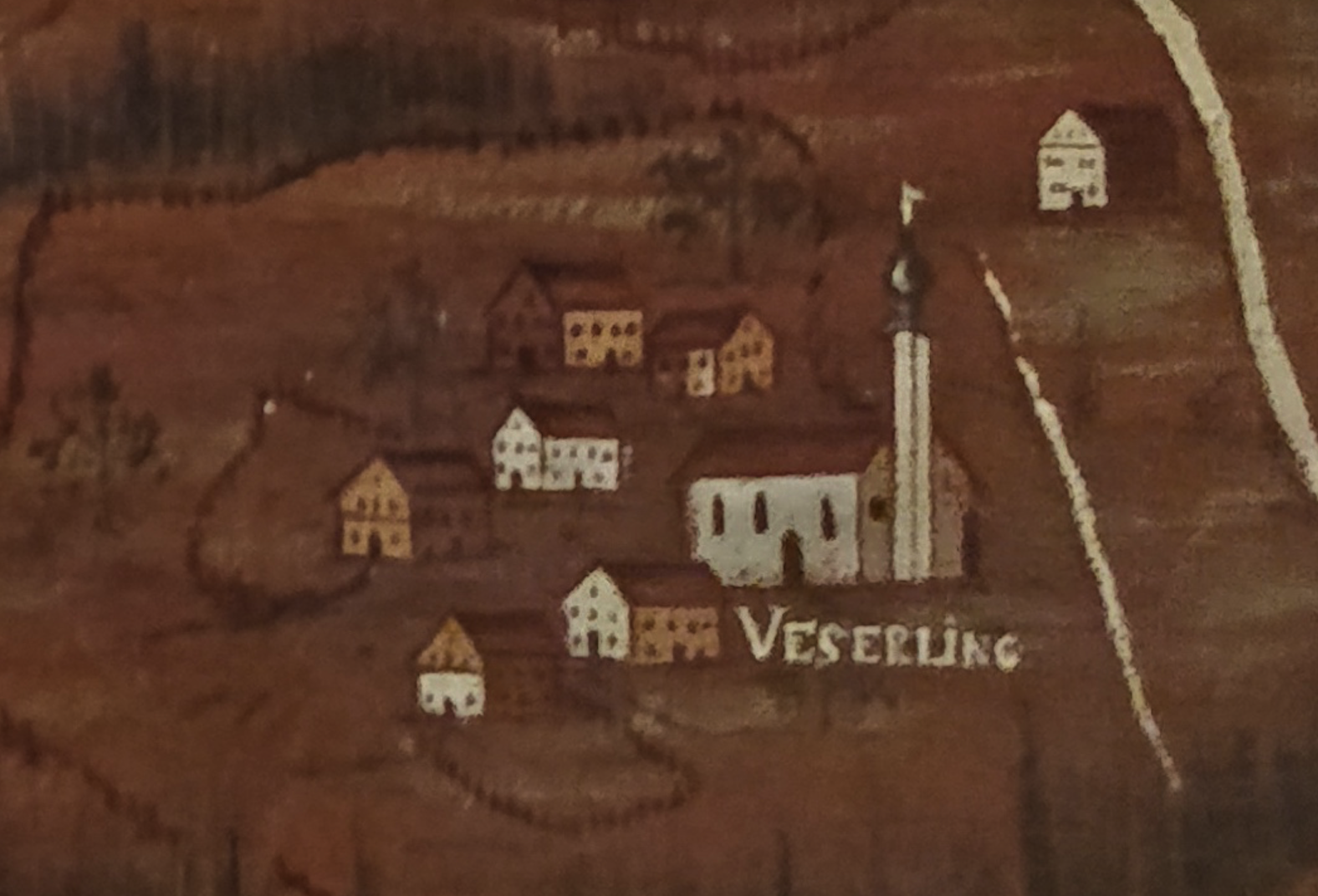 Ausschnitt „Urschalling“ einer historischen Karte